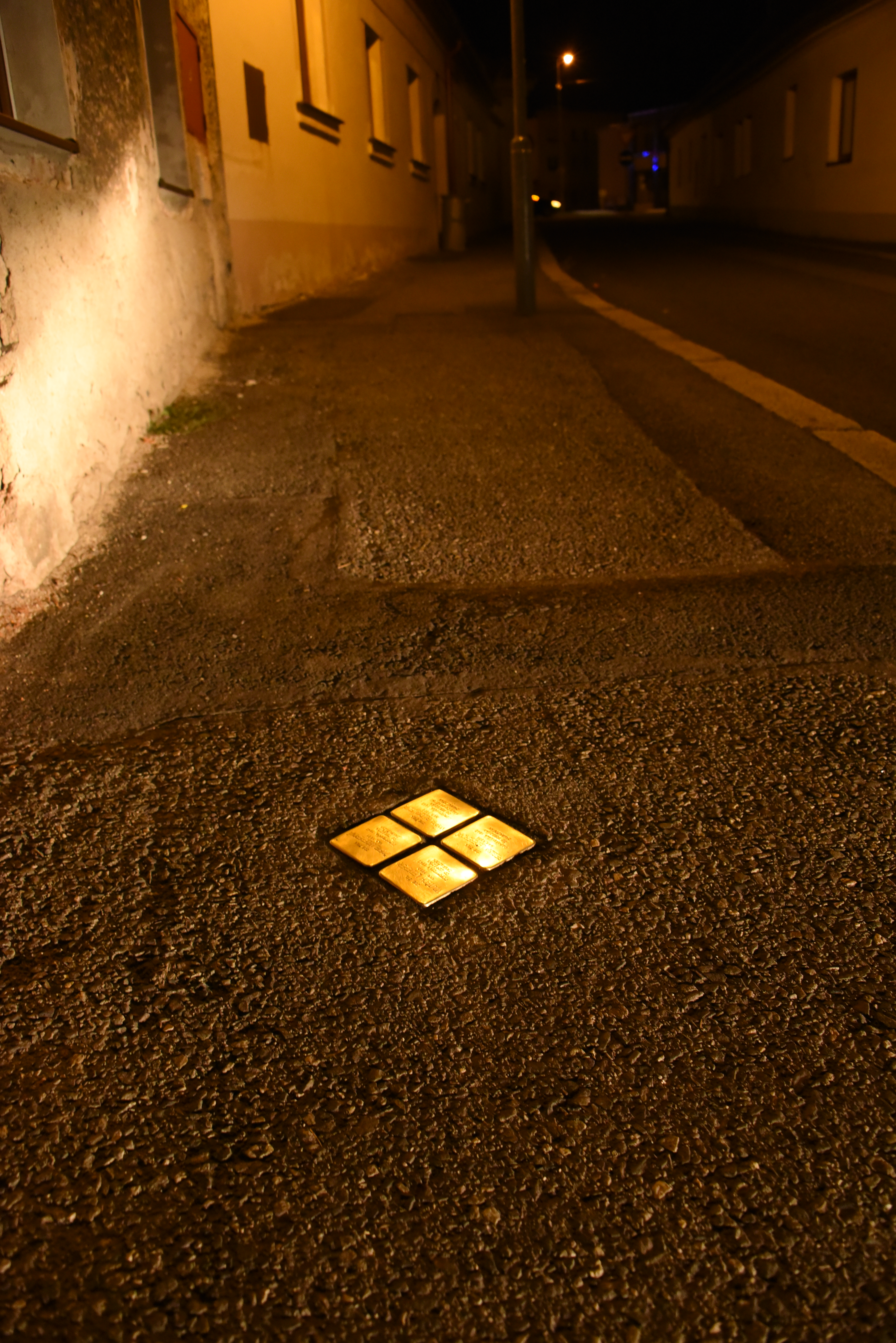 Stolpersteine für Familie Lederer, Jiřího z Poděbrad 228